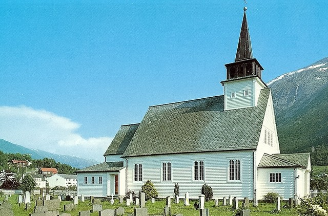 Uskedalen kyrkje